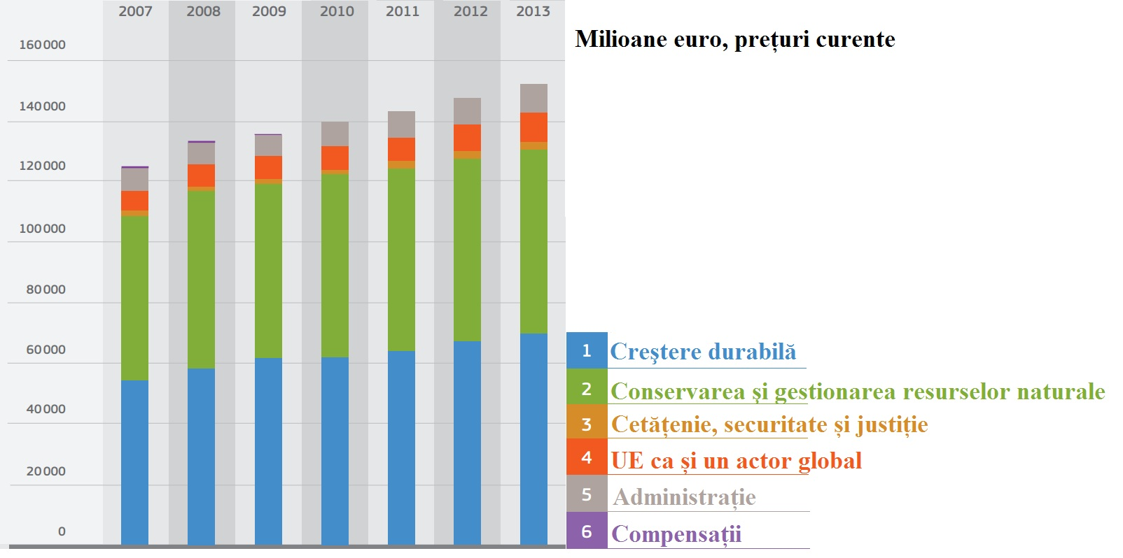 Cadrul financiar multianual 2007 - 2013 al bugetului Uniunii Europene, în milioane euro, prețuri curente